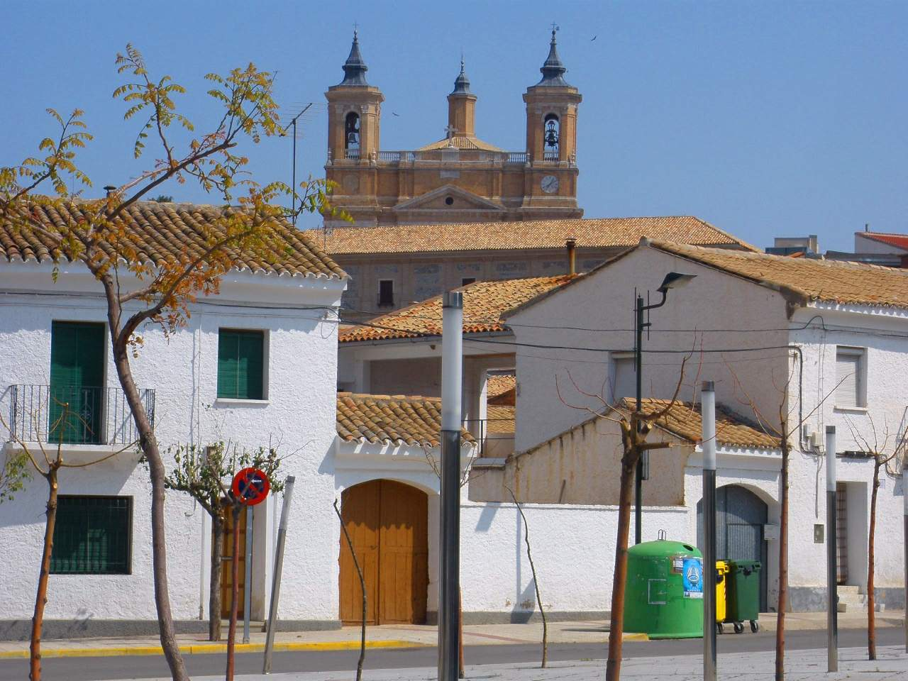 Épila (Zaragoza)